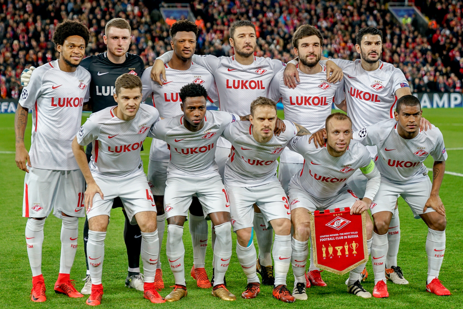 Прощание с Лигой чемпионов и грандиозное фиаско